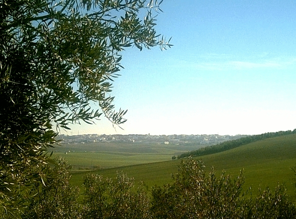 Fernán Núñez, provincia de Córdoba (España)